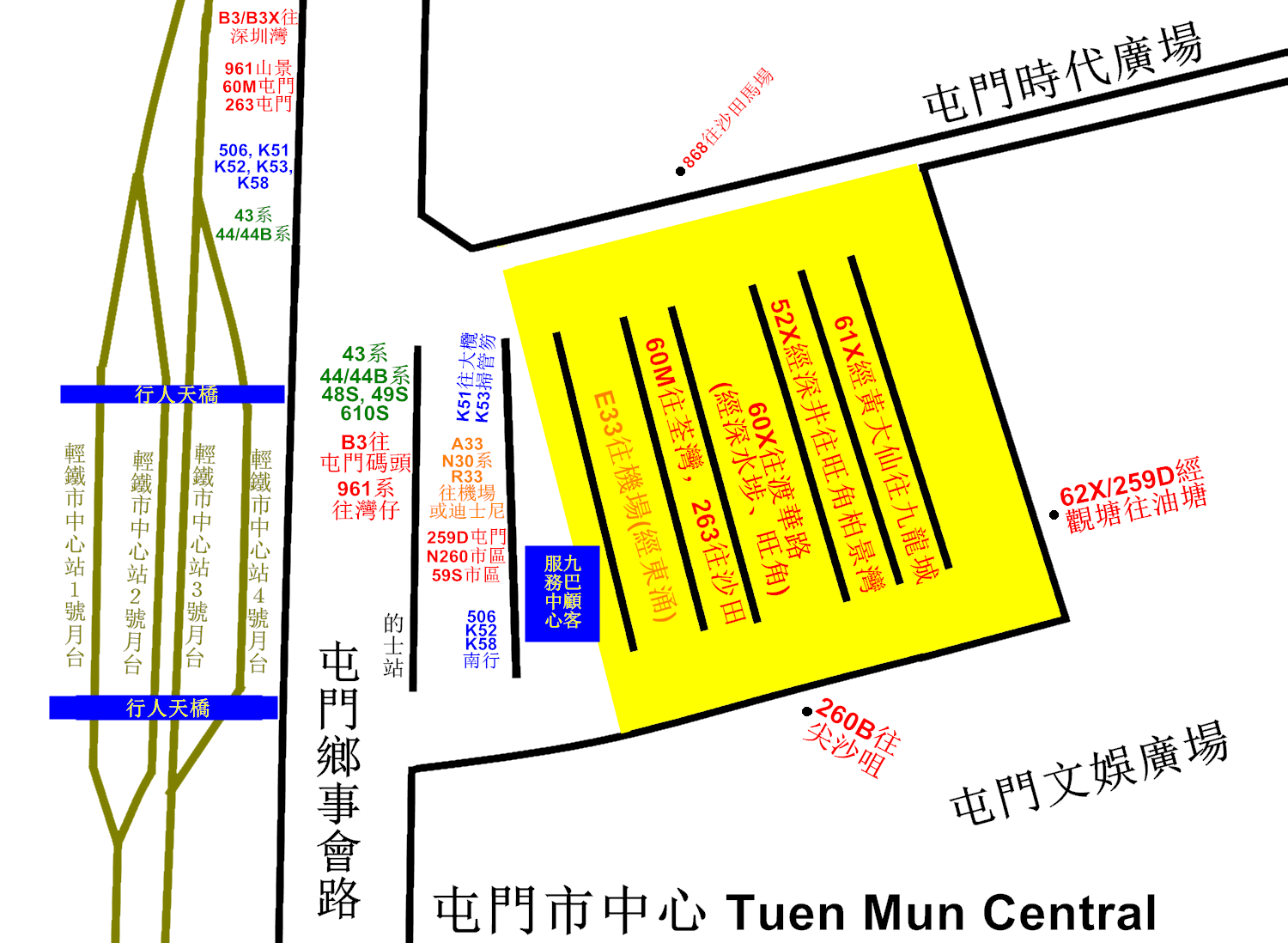 中文（香港）: 屯門市中心巴士總站的平面圖